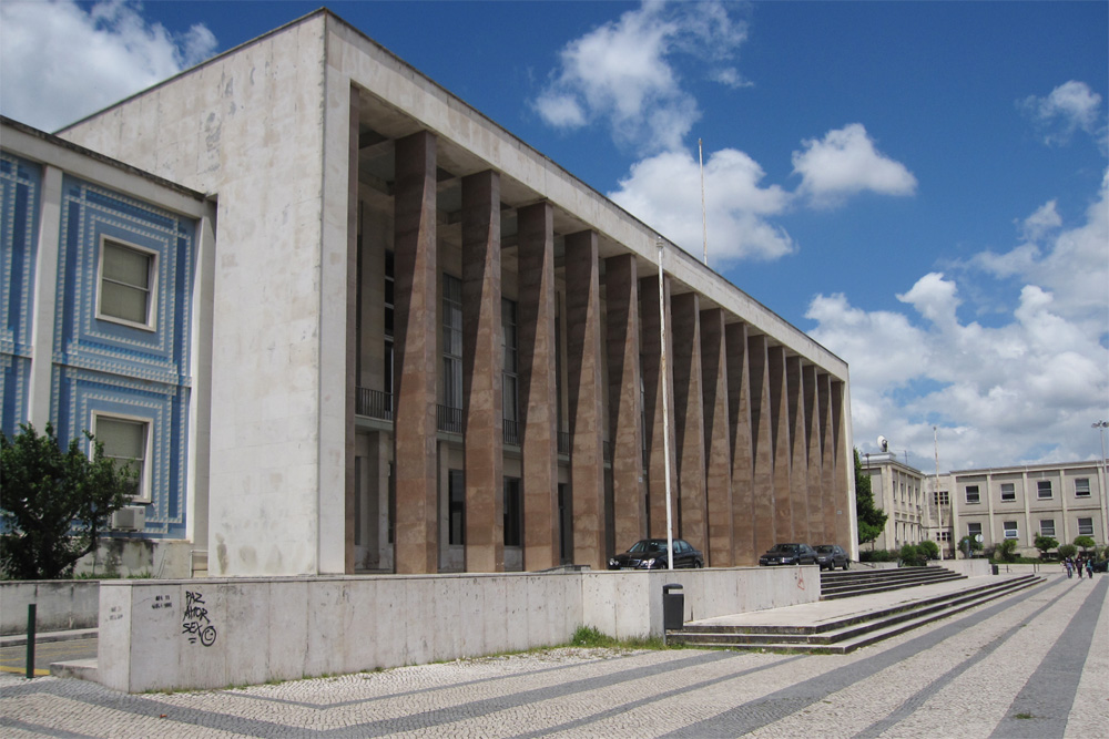 Reitoria, Universidade de Lisboa; Arq. Pardal Monteiro